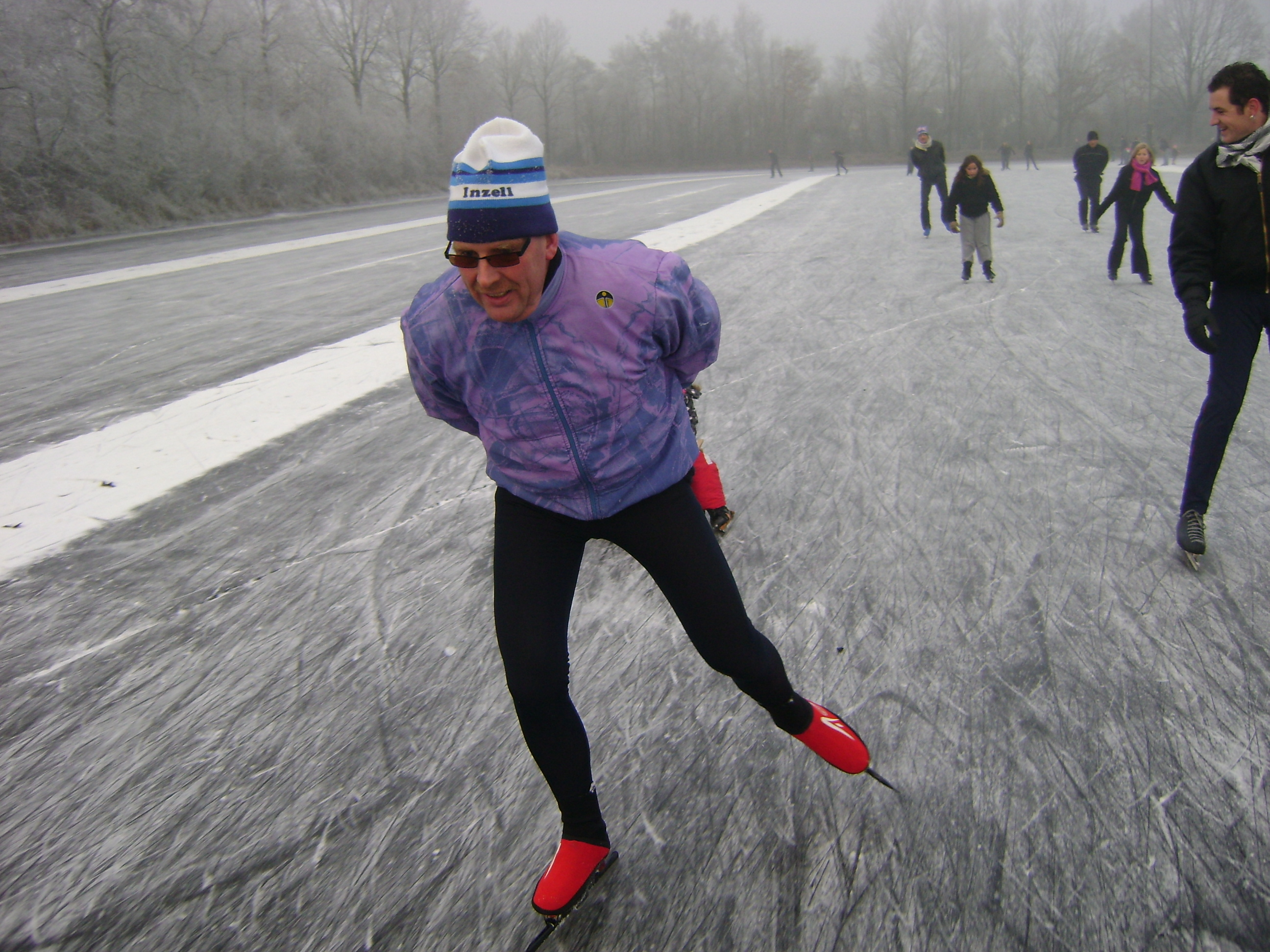 Schaatser op de IJsbaan Ureterp in 2008.